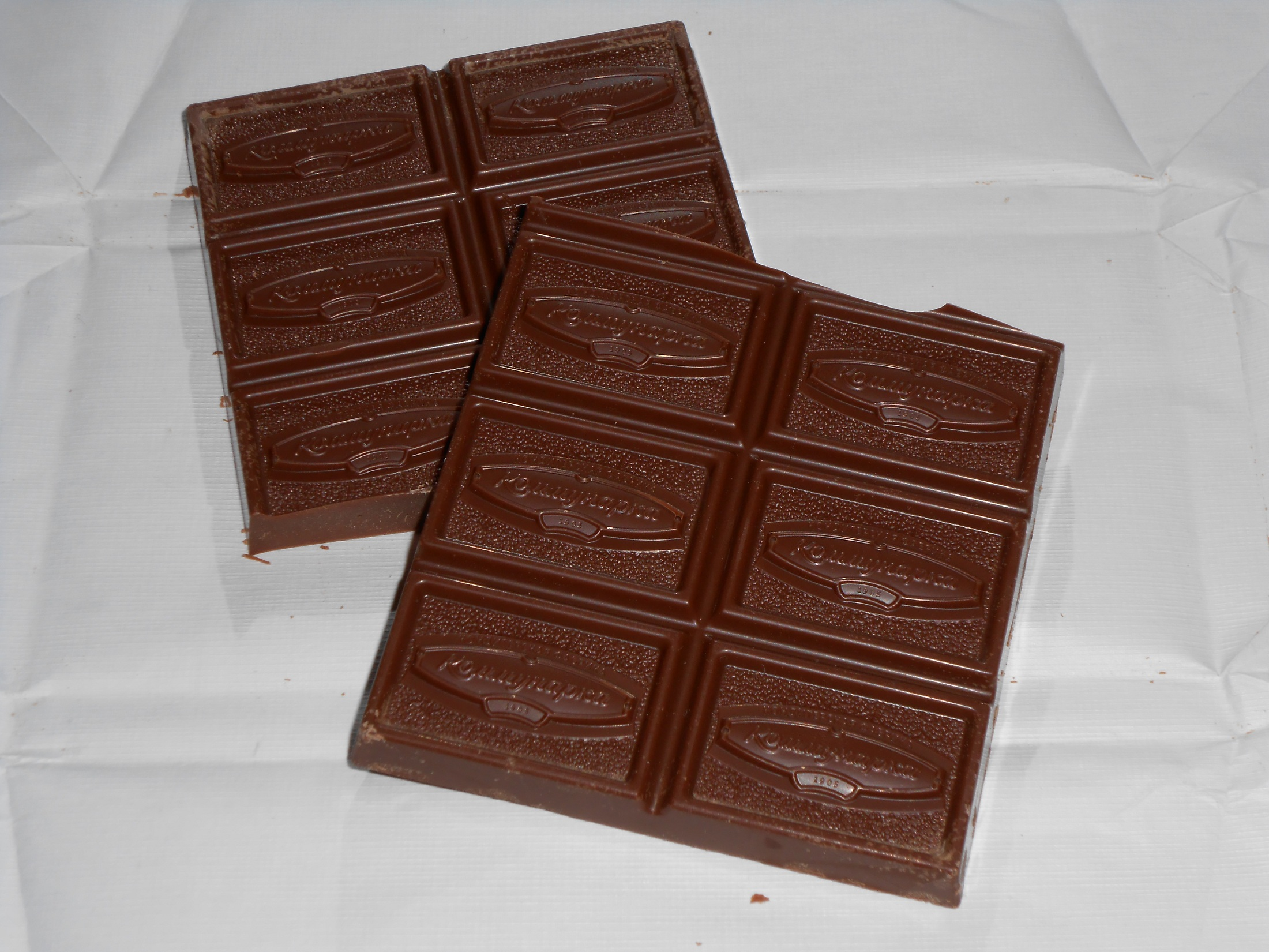 Шоколад молочный "Любимая Алёнка" фабрики Коммунарка. Произведено в г. Минск, Беларусь. 100 грамм Taken with Nikon Coolpix S2700